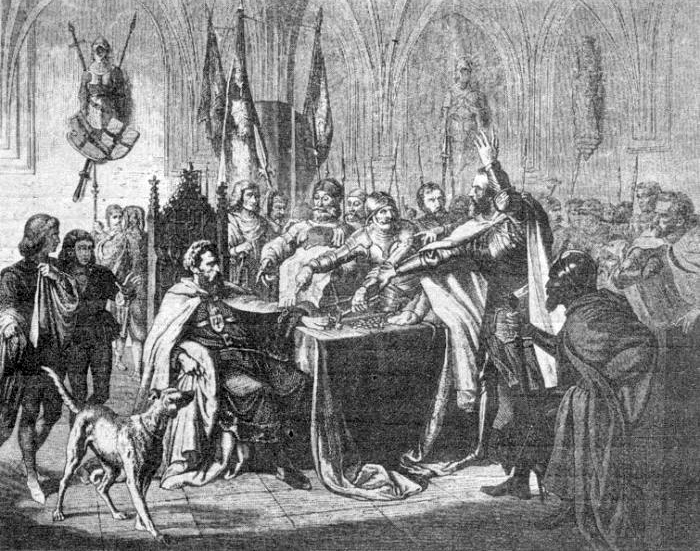 XIX-wiecznyu drzeworyt nieznanego autora, przedstawiający negocjacje najemników z władzami zakonu krzyżackiego - za stołem siedzi wielki mistrz Ludwig von Erlichshausen, stawiający żądania rycerz to Bernard von Zinnenberg. Drzeworyt powstał ok. 1859 r.